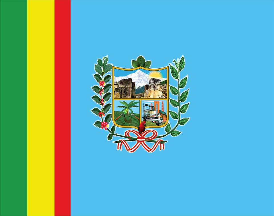 Bandera Distrital de Huayopata